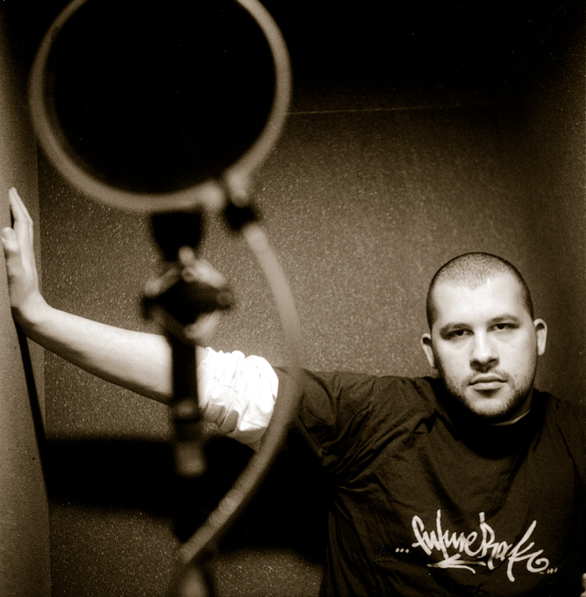 Rapper Torch im Studio bei DJ Rick Ski